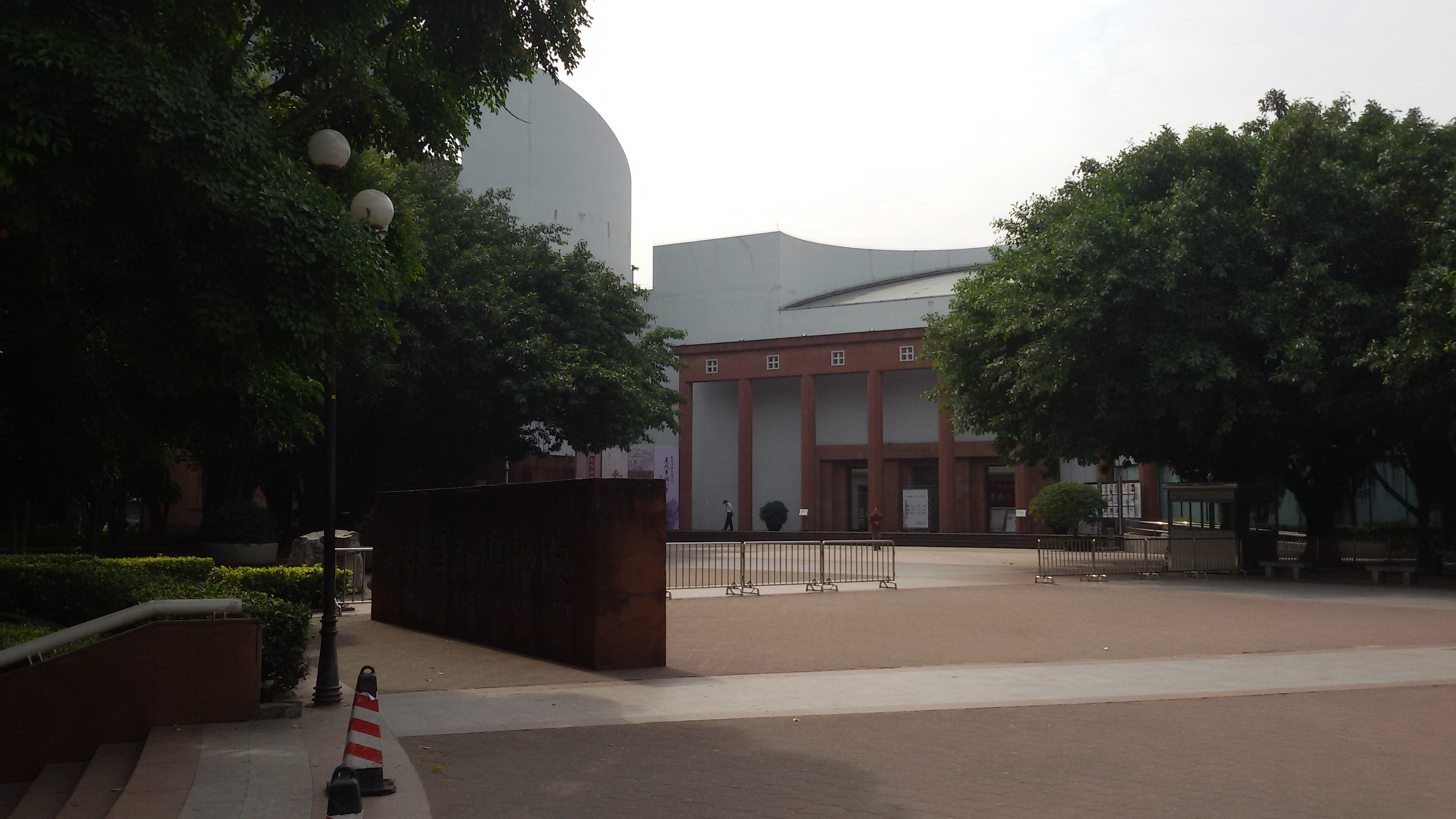 粵語: 广州艺术博物馆